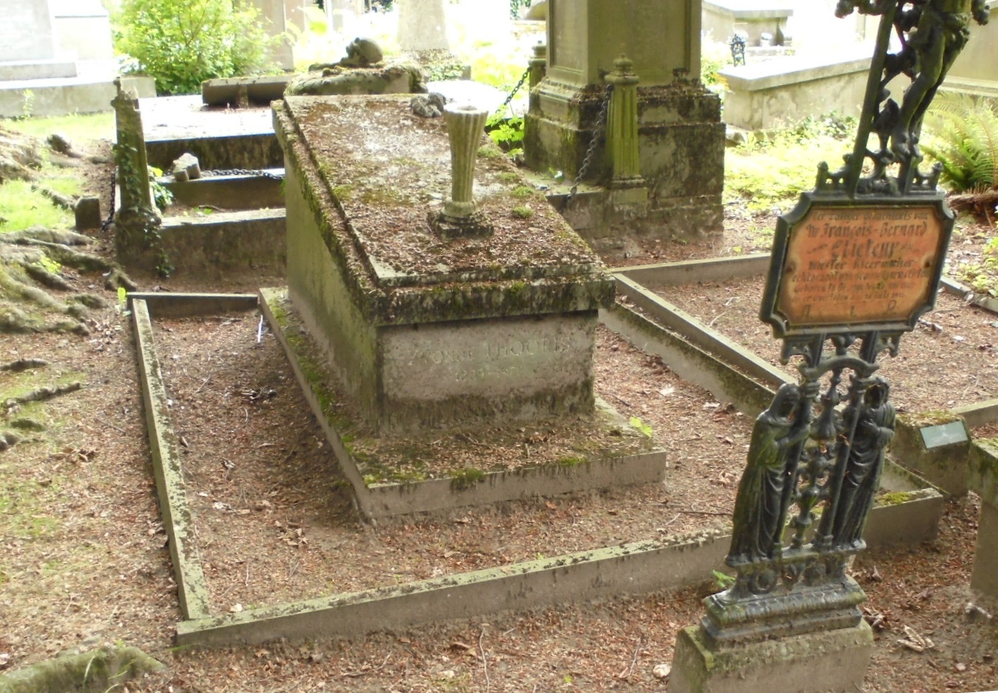 Graf van Albert Thooris en zijn dochter Yvonne op de Centrale Begraafplaats van Brugge (Steenbrugge), vak 7. Beschrijving volgens De centrale begraafplaats te Assebroek-Brugge, 1993: "Eenvoudige tombe met schuinliggende marmeren gedenkplaat waarop een roos en een neoclassicistische vaas."